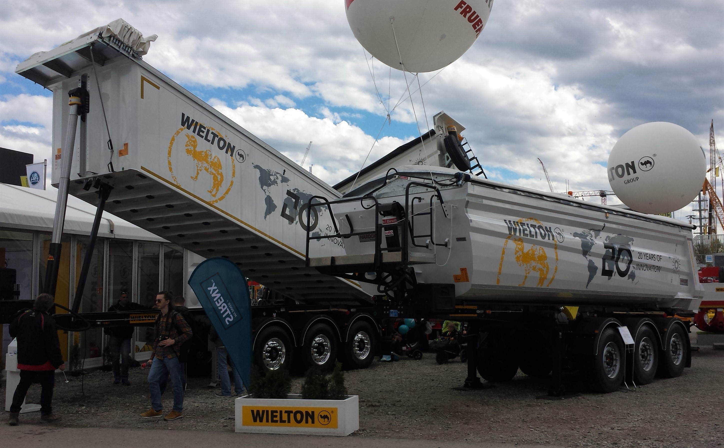 Foto zweier Sattelkipper des Herstellers Wielton an dessen Messestand während der Bauma im Jahr 2016 in München.